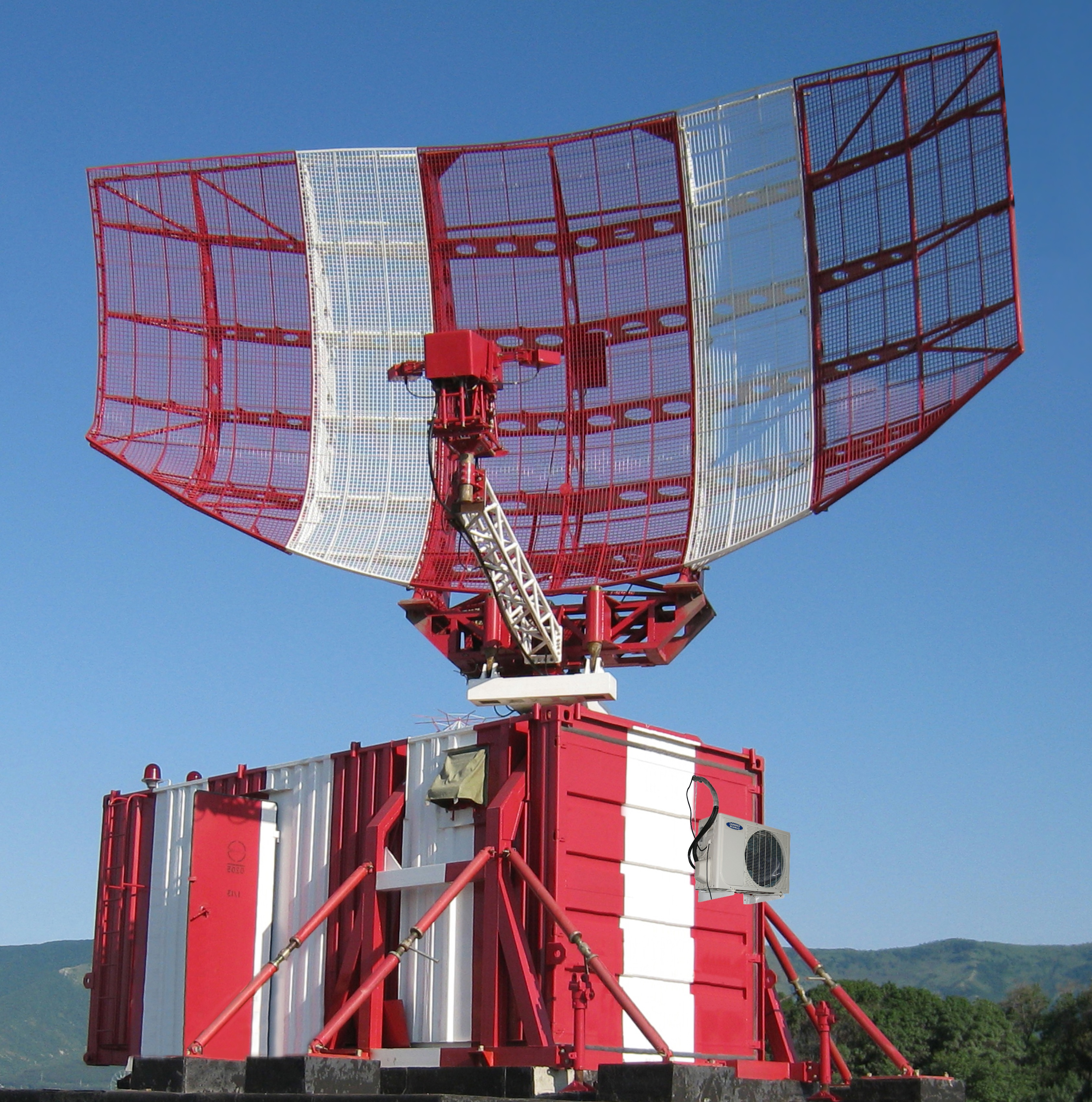 Челябинский радиозавод "Полёт"